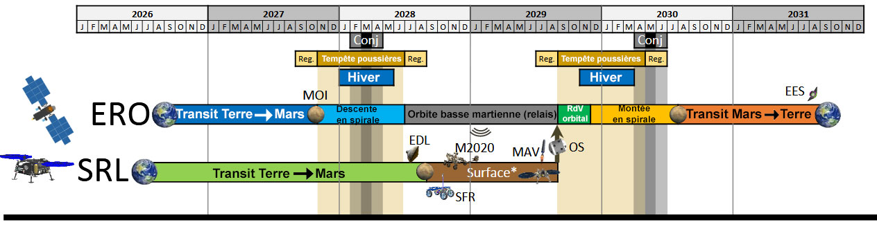 Planning de la mission de retour d'échantillons martiens (version francaise) scénario d'avril 2020 source : MEPAG